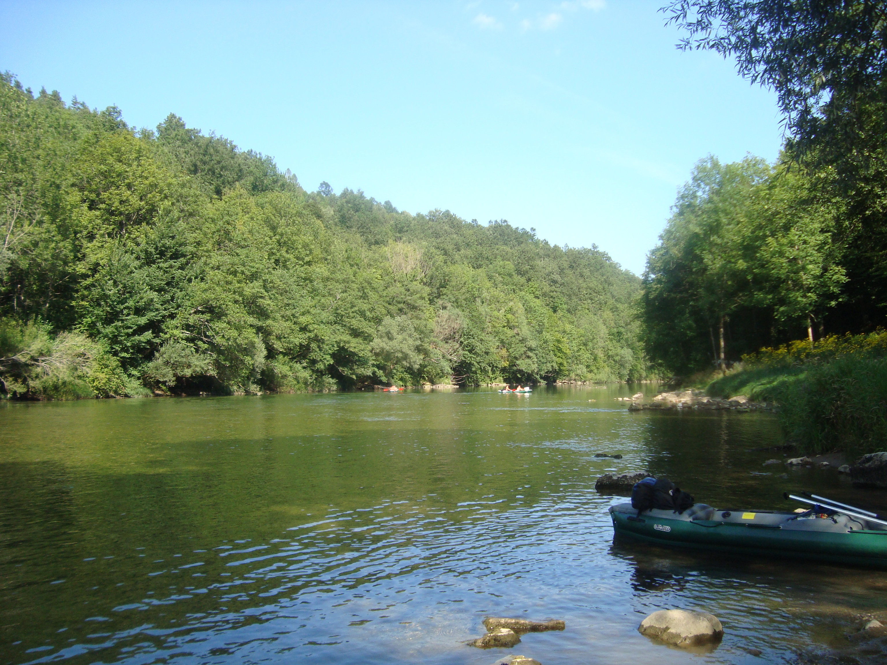 rijeka kupa